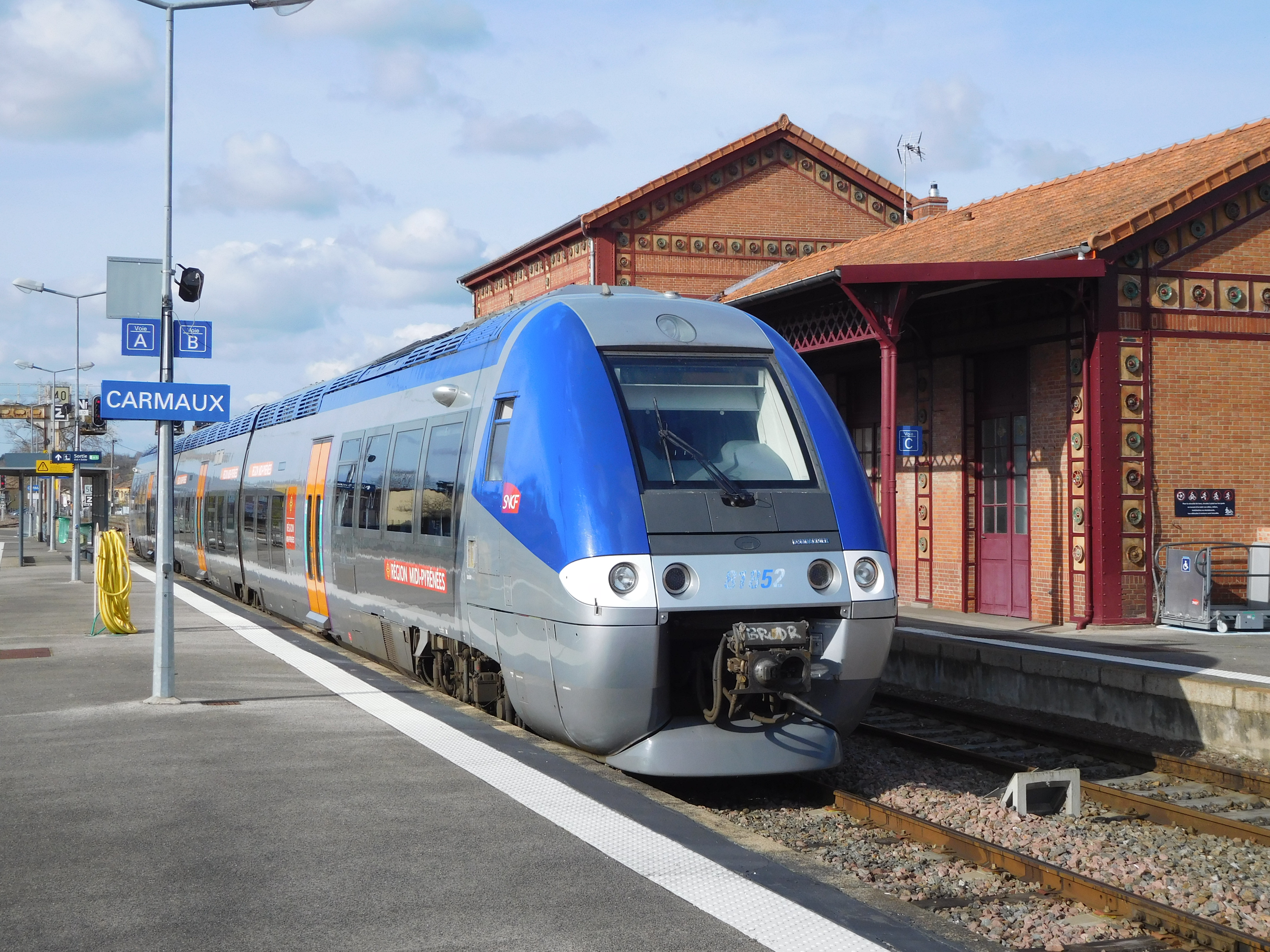 Un AGC B81851/52 à l'arrêt en gare de Carmaux (81).